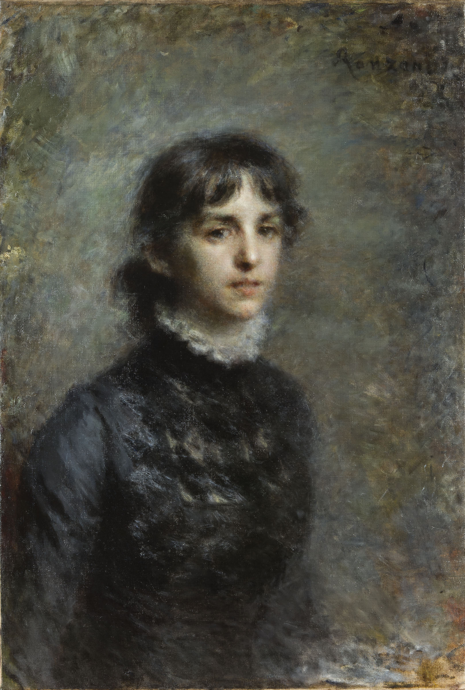 Ritratto della signora Antonietta Tzikos di Saint Leger - Daniele Ranzoni